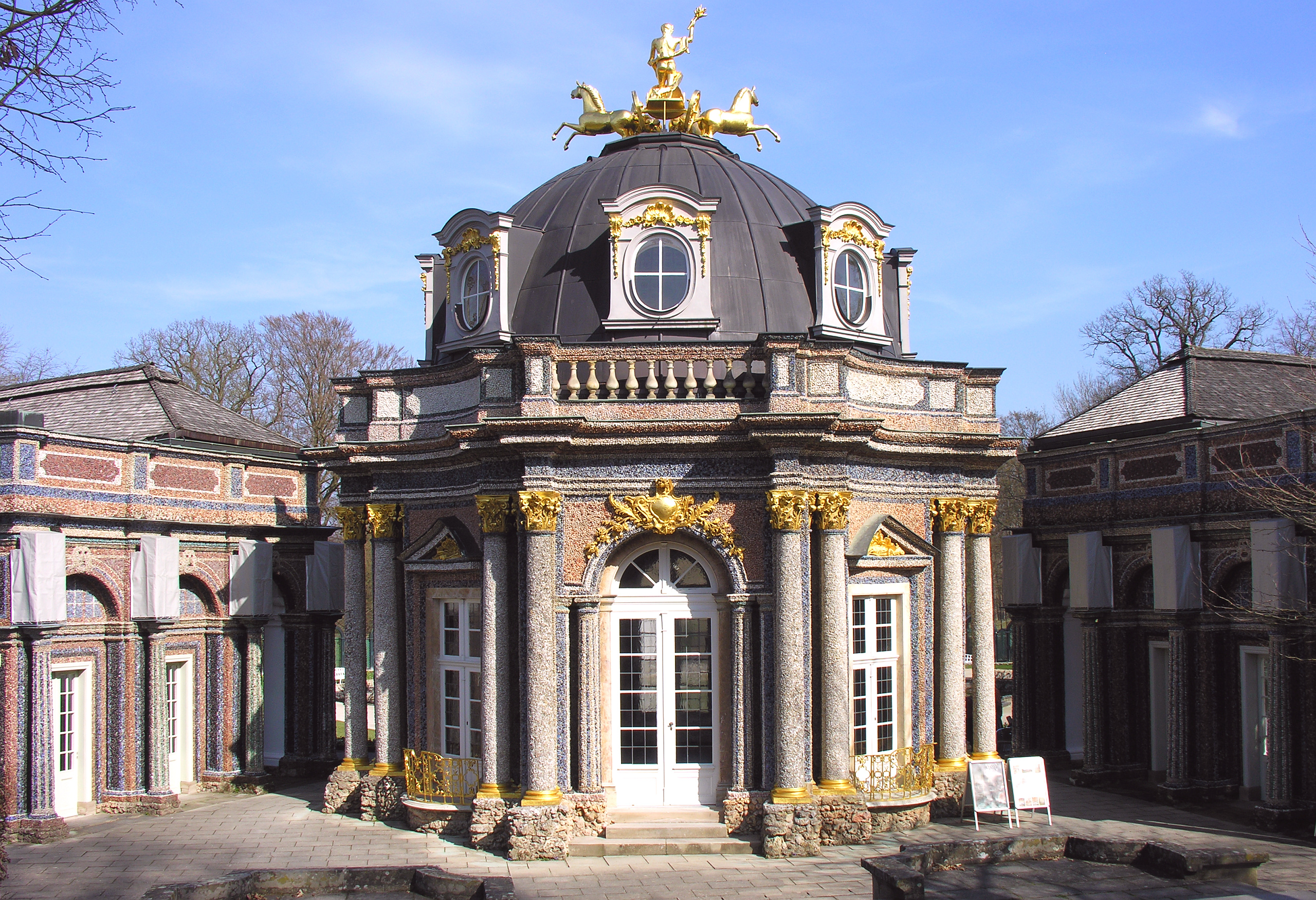 Eremitage, das neue Schloss aus 1753 von der Eingangsseite, Bayreuth, Bayern, Germany - Foto Wolfgang Pehlemann DSCN7041